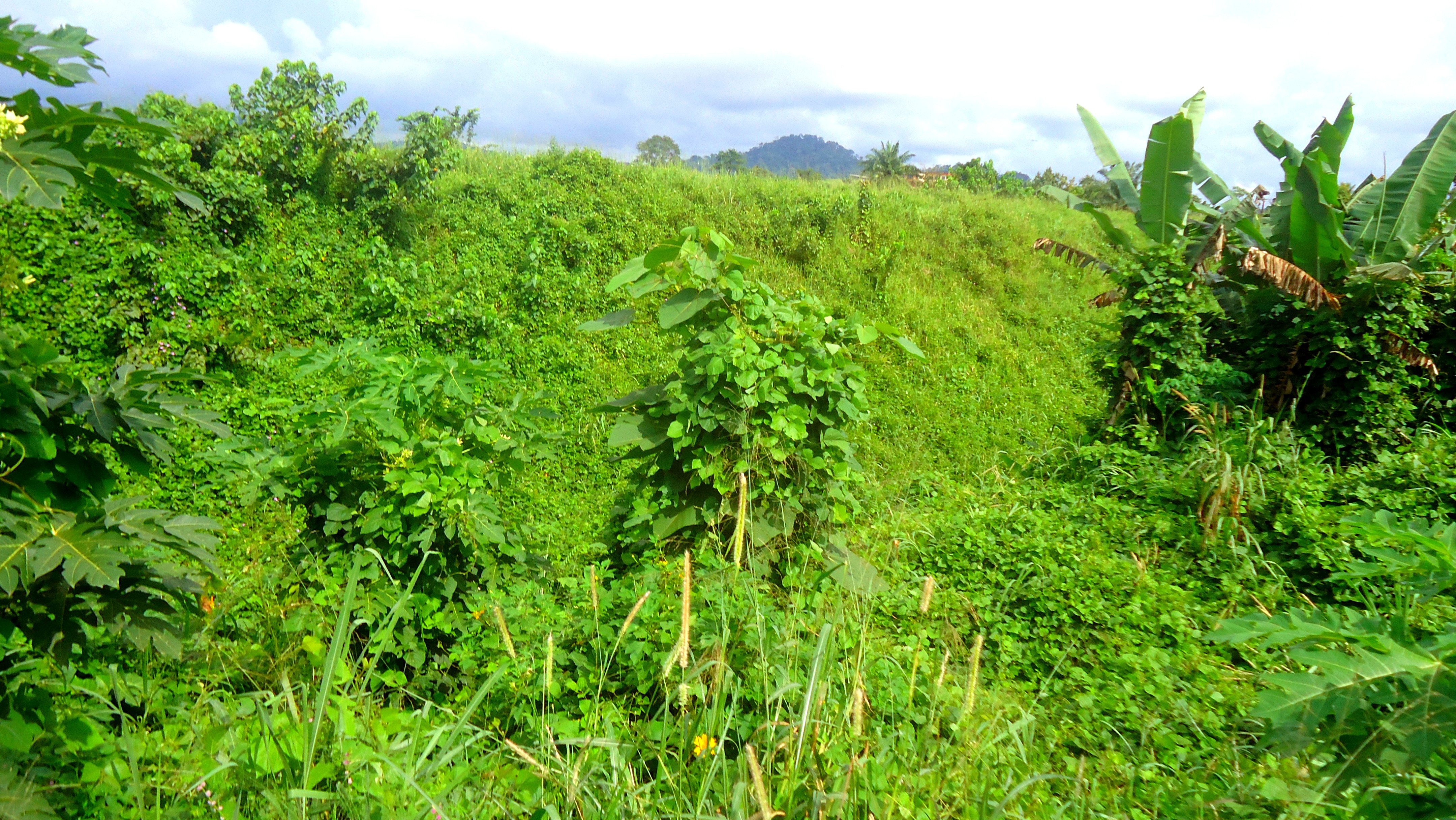 Cette image représente le ravin dans lequel le train qui a déraillé et a causé la mort d'une centaine de personnes en octobre 2016, a échoué.